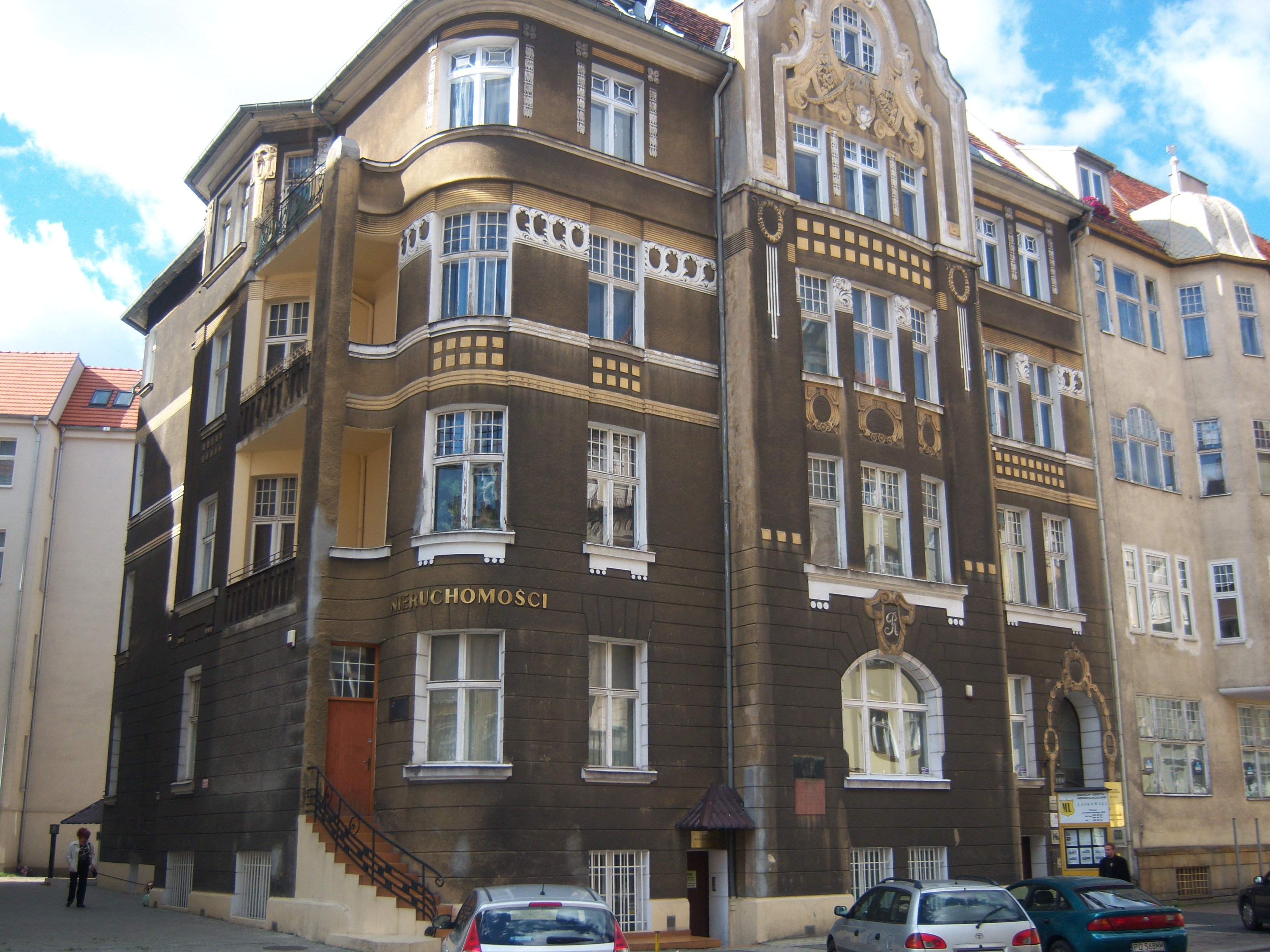 Poznań, ul. Chełmońskiego 22 - kamienica (zabytek nr A 340)